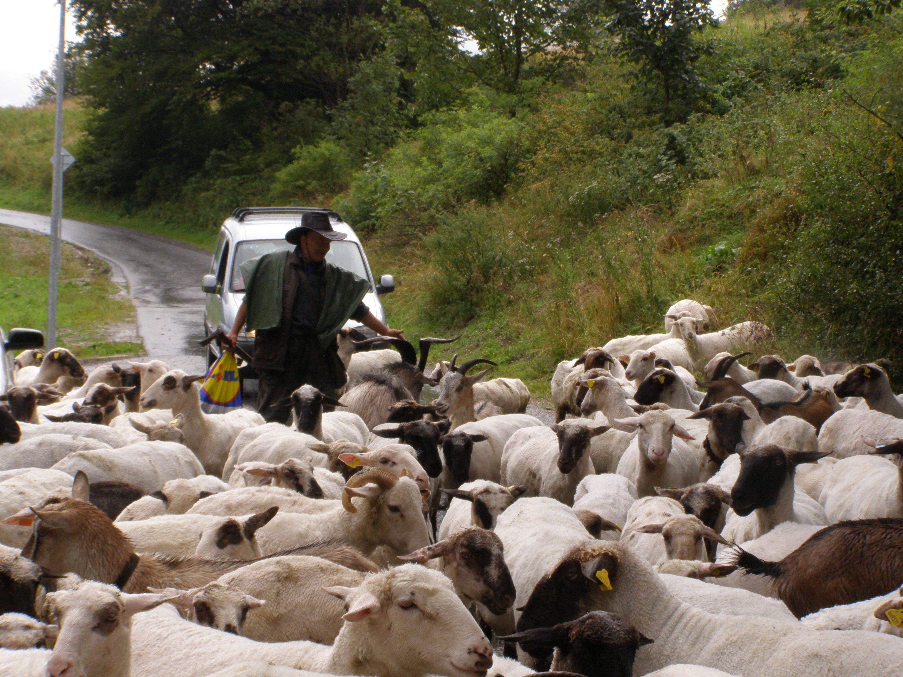 Donovaly, stádo ovcí s bačou cestou do osady Polianka